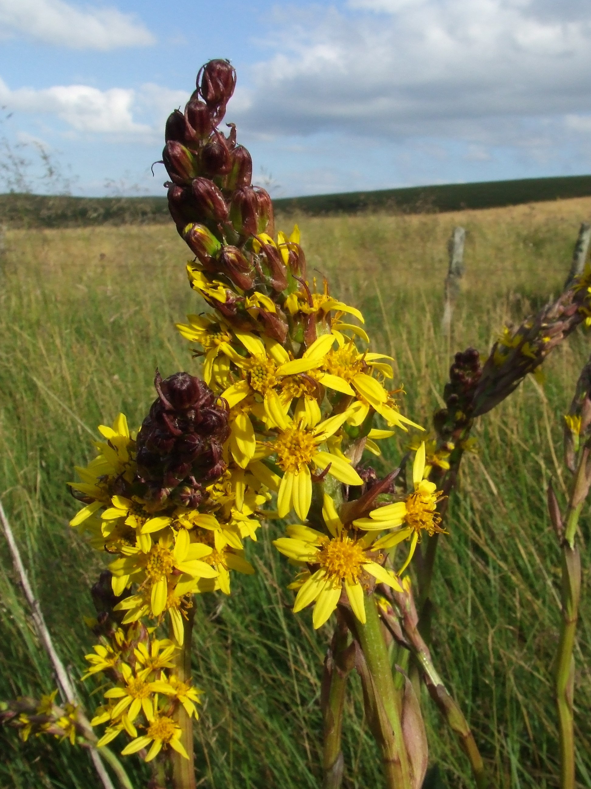 Ligulaire de Sibérie (Ligularia sibirica), espèce relictuelle des dernières glaciations, photographiée ici en France où elle est très rare, dans la tourbière des Chastelets, Puy-de-Dôme.